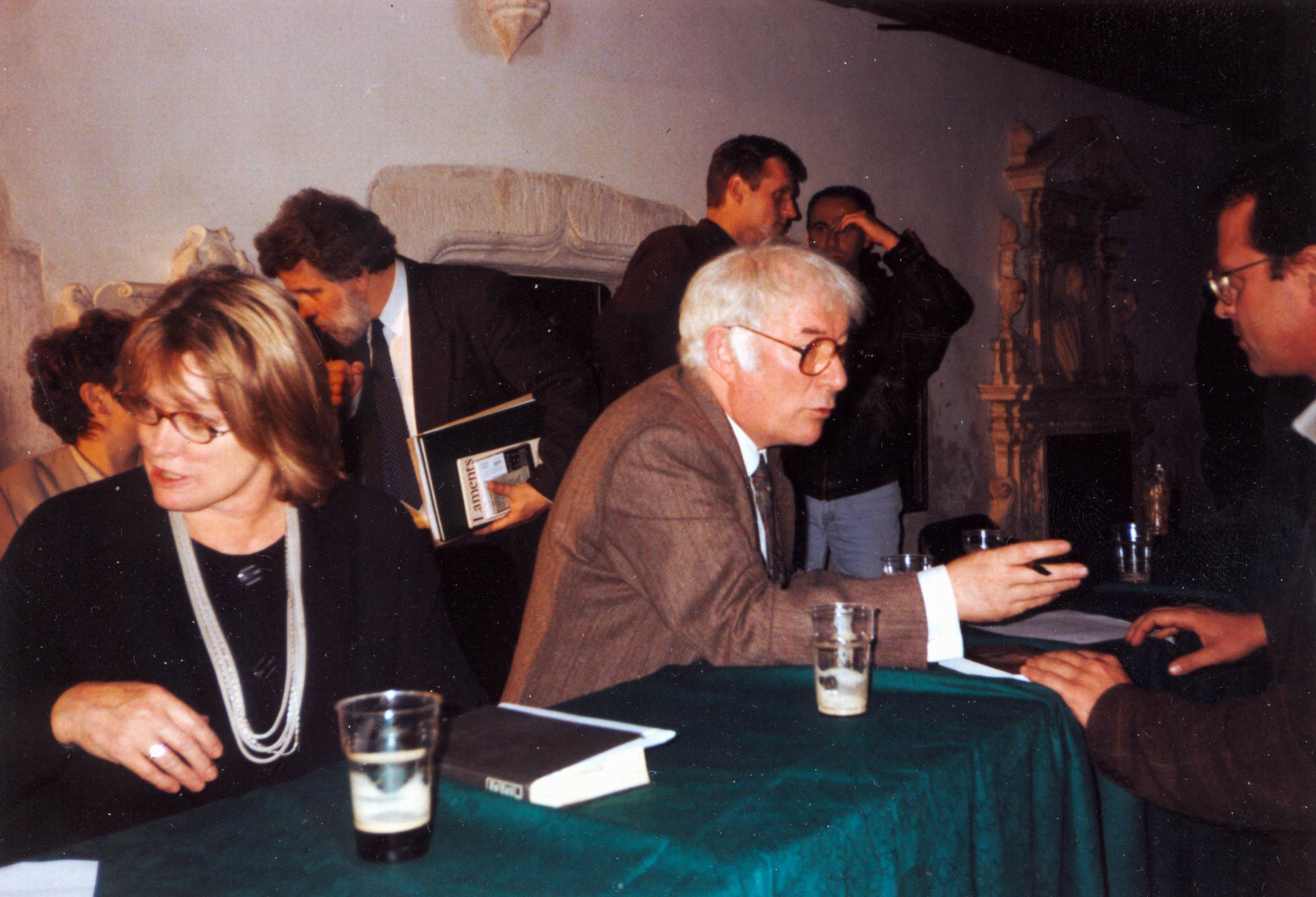 Seamus i Marie Heaney, Wieczór Irlandzki, kościół Dominikanów w Krakowie, 4 października 1996Seamus and Marie Heaney, Irish Night at the Dominican Church, Kraków, 4 Oct 1996